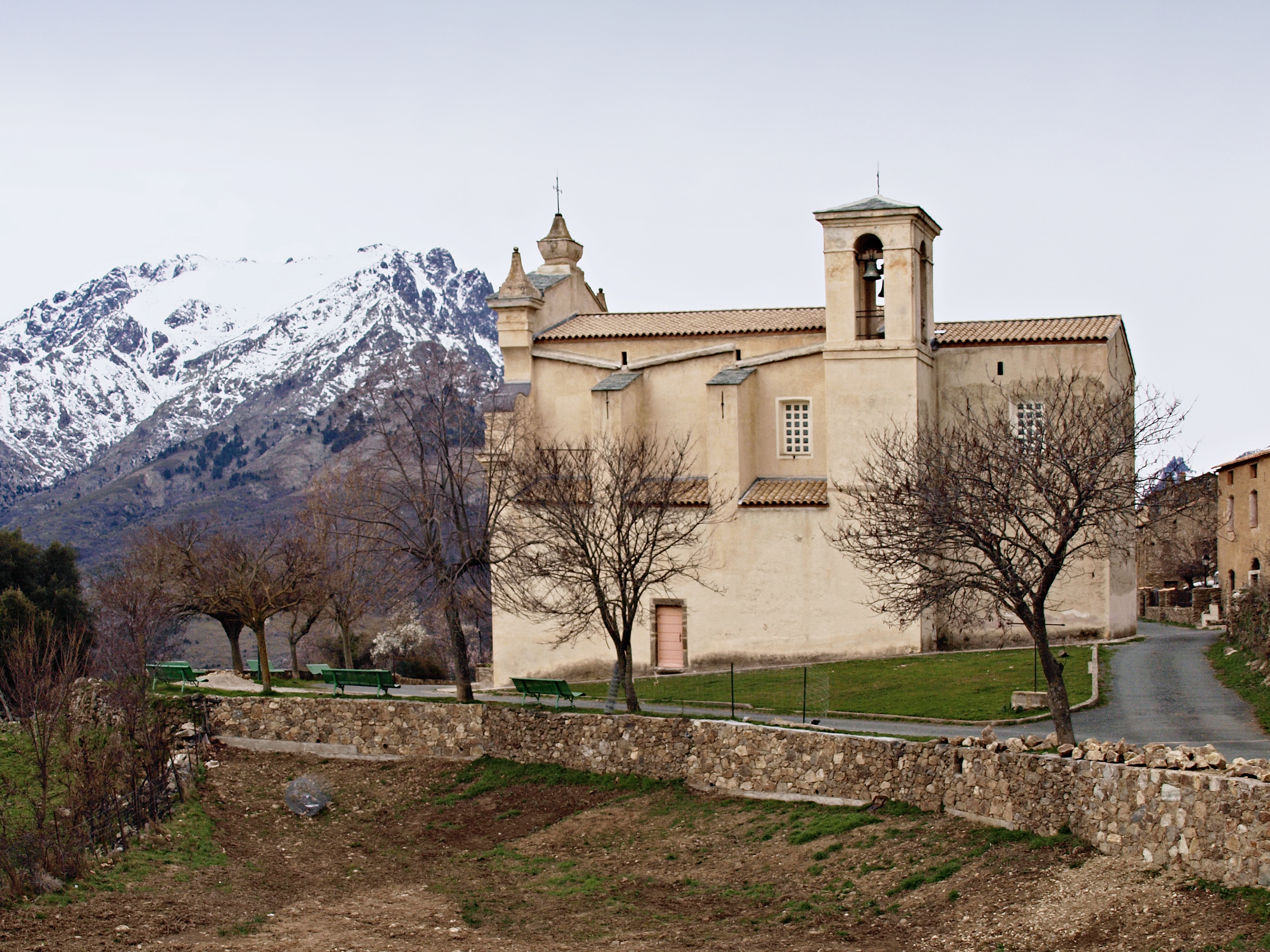 Vallica (Corsica) - Église de la Nativité et le Monte Padro